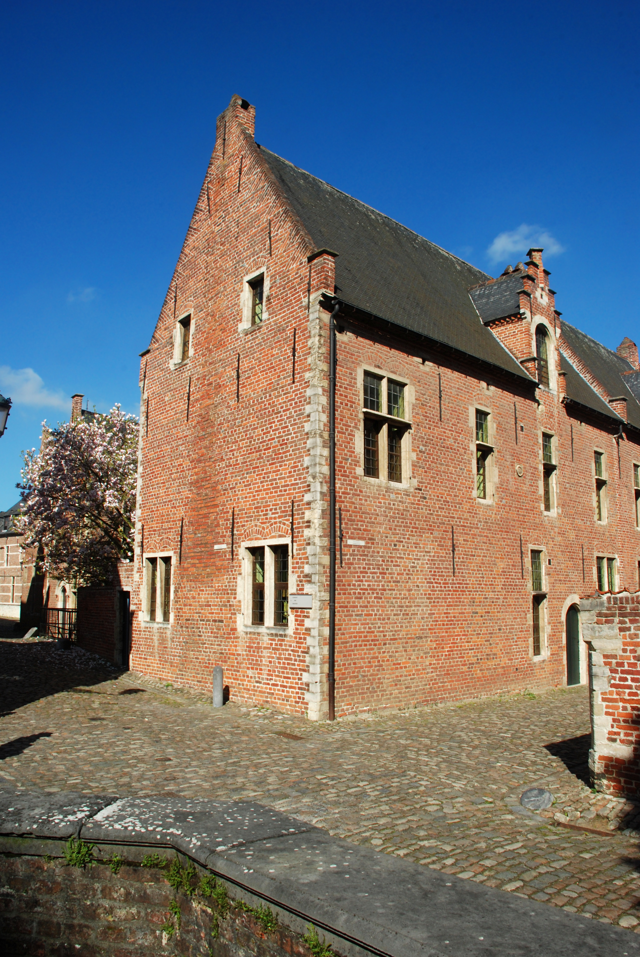 Belgium - Leuven - Groot Begijnhof - Couvent des sept Douleurs / Convent van de 7 Weeën - Middenstraat n° 47